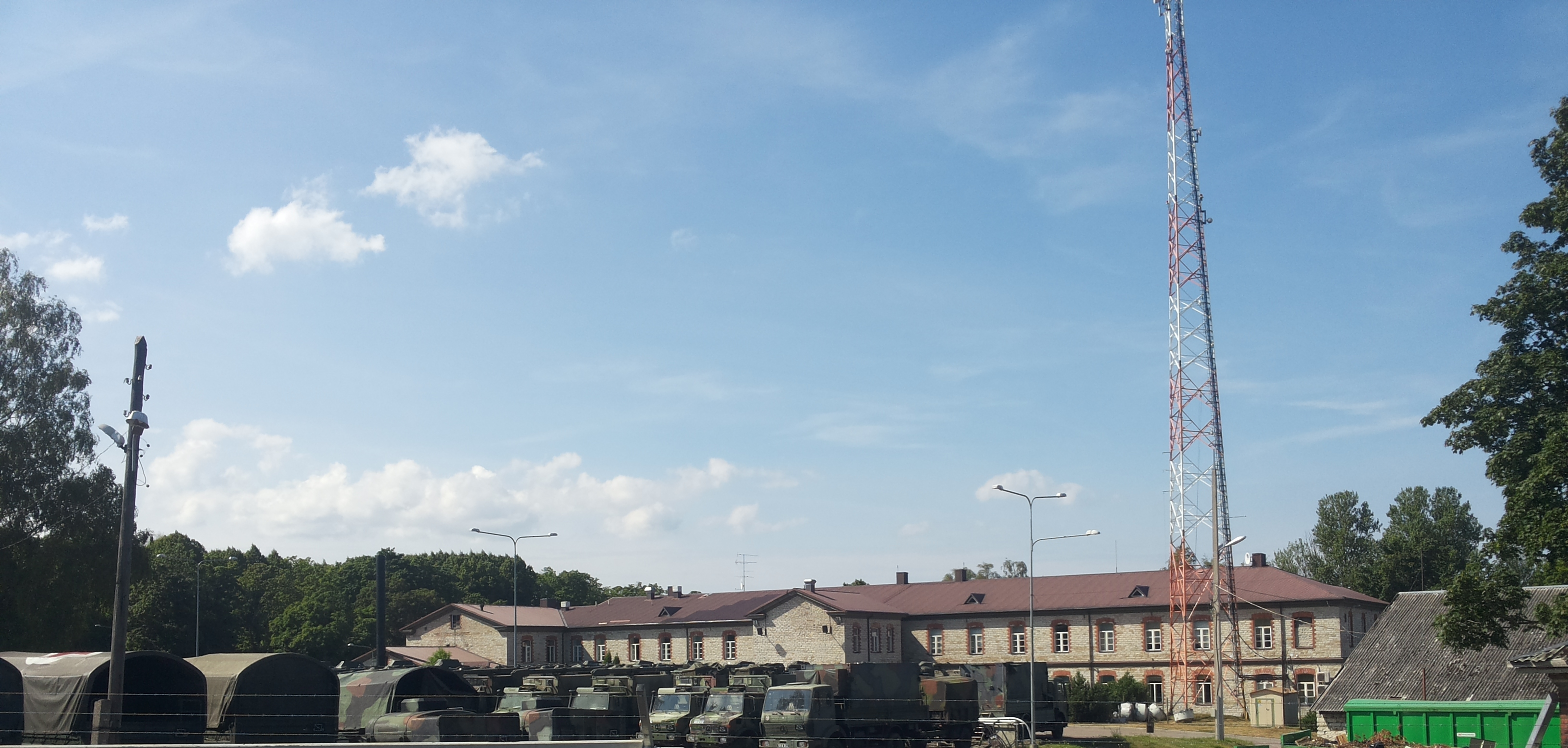 Dünaburgi kasarmud